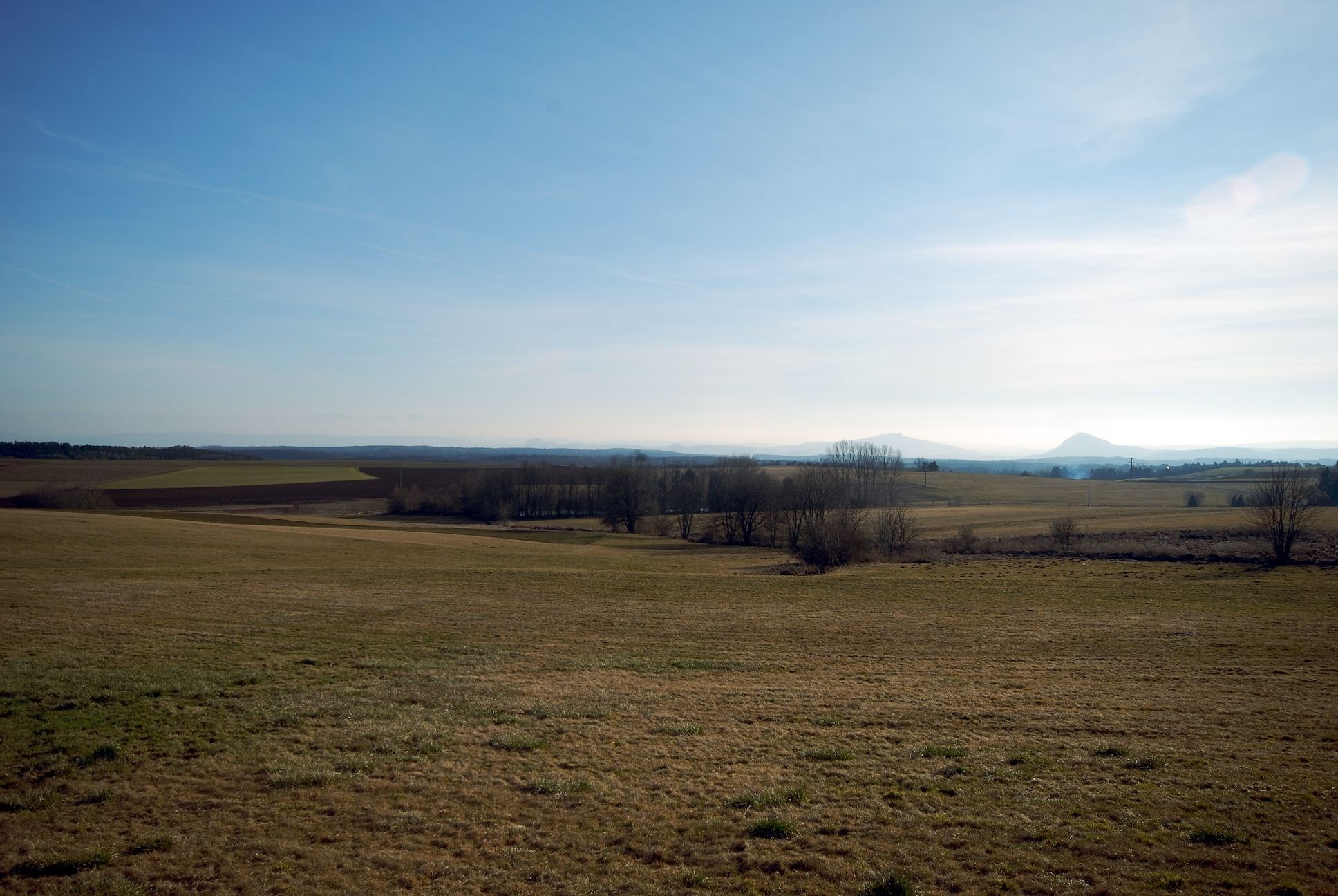 Hegaualb